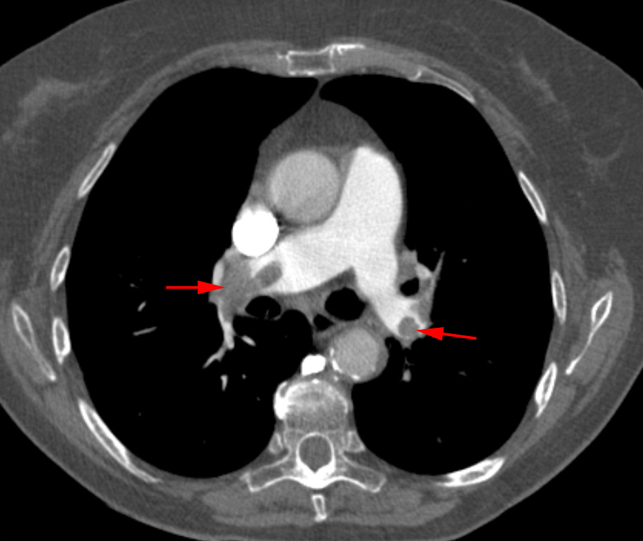 Lungenarterienembolie in der Computertomographie.